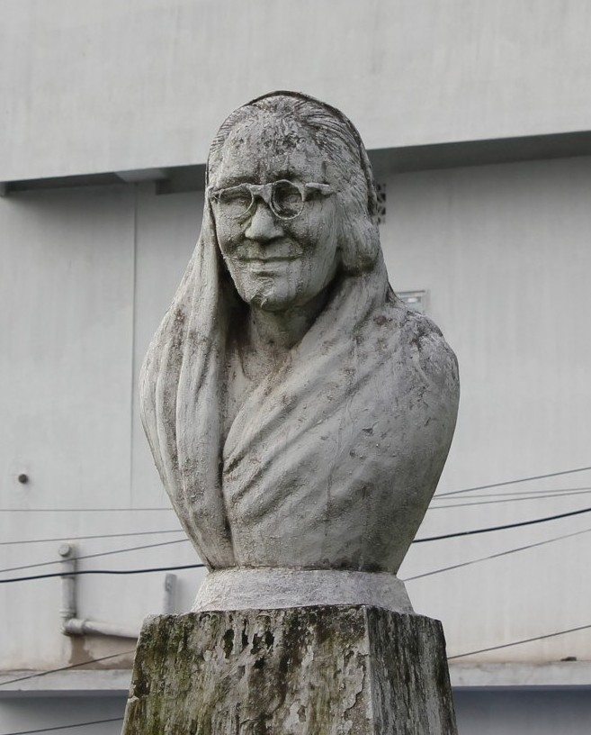 গুৱাহাটীৰ পল্টনবজাৰৰ শ্বহীদ উদ্যানত পদ্মশ্রী নলিনী বালা দেৱীৰ আবক্ষ মূর্তি।